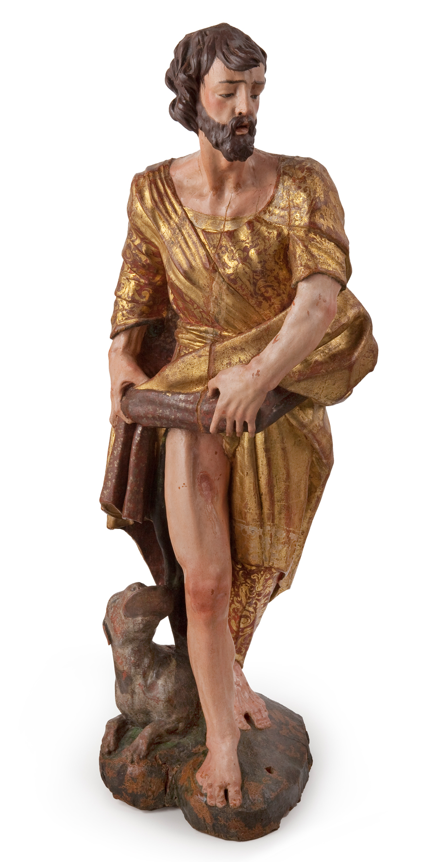 Sant Roc. Valladolid, 1526-1532. Talla policromada 91x34x27,5cm